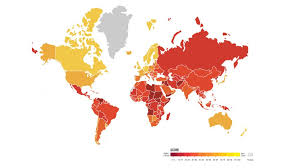 IPC del año 2019